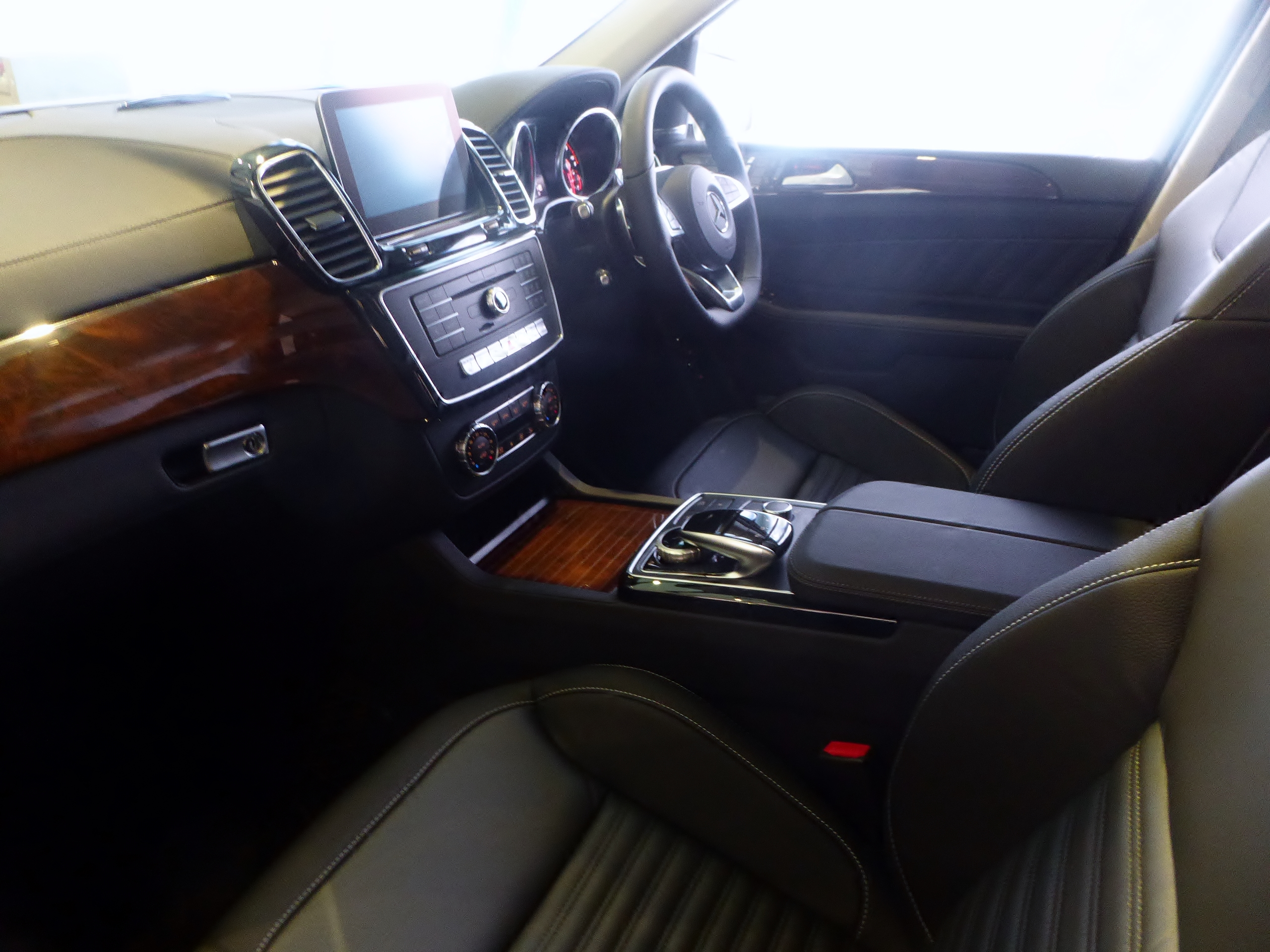 X166型メルセデス・ベンツ・GLS350d 4MATICスポーツのインテリアを撮影。